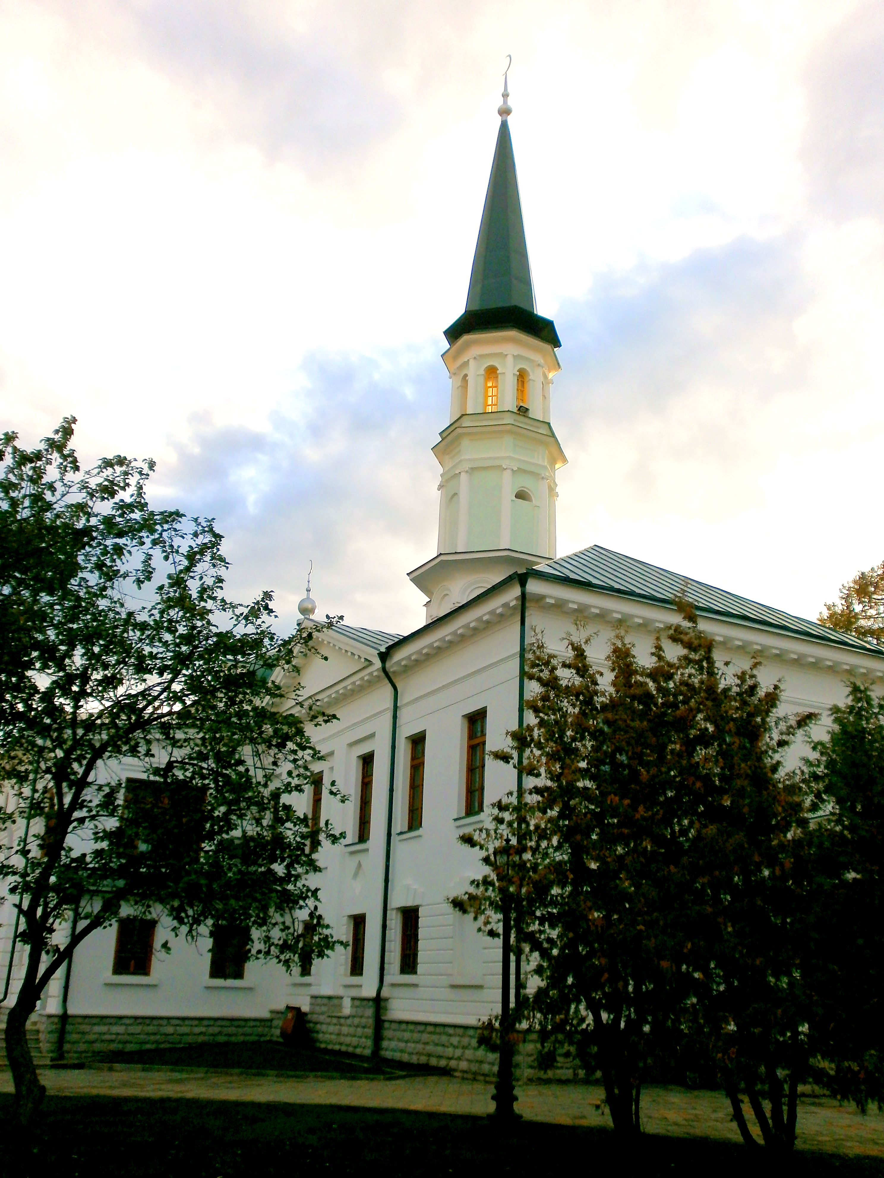 Мечеть при духовном управлении (Республика Башкортостан, Уфа, тукаева улица)